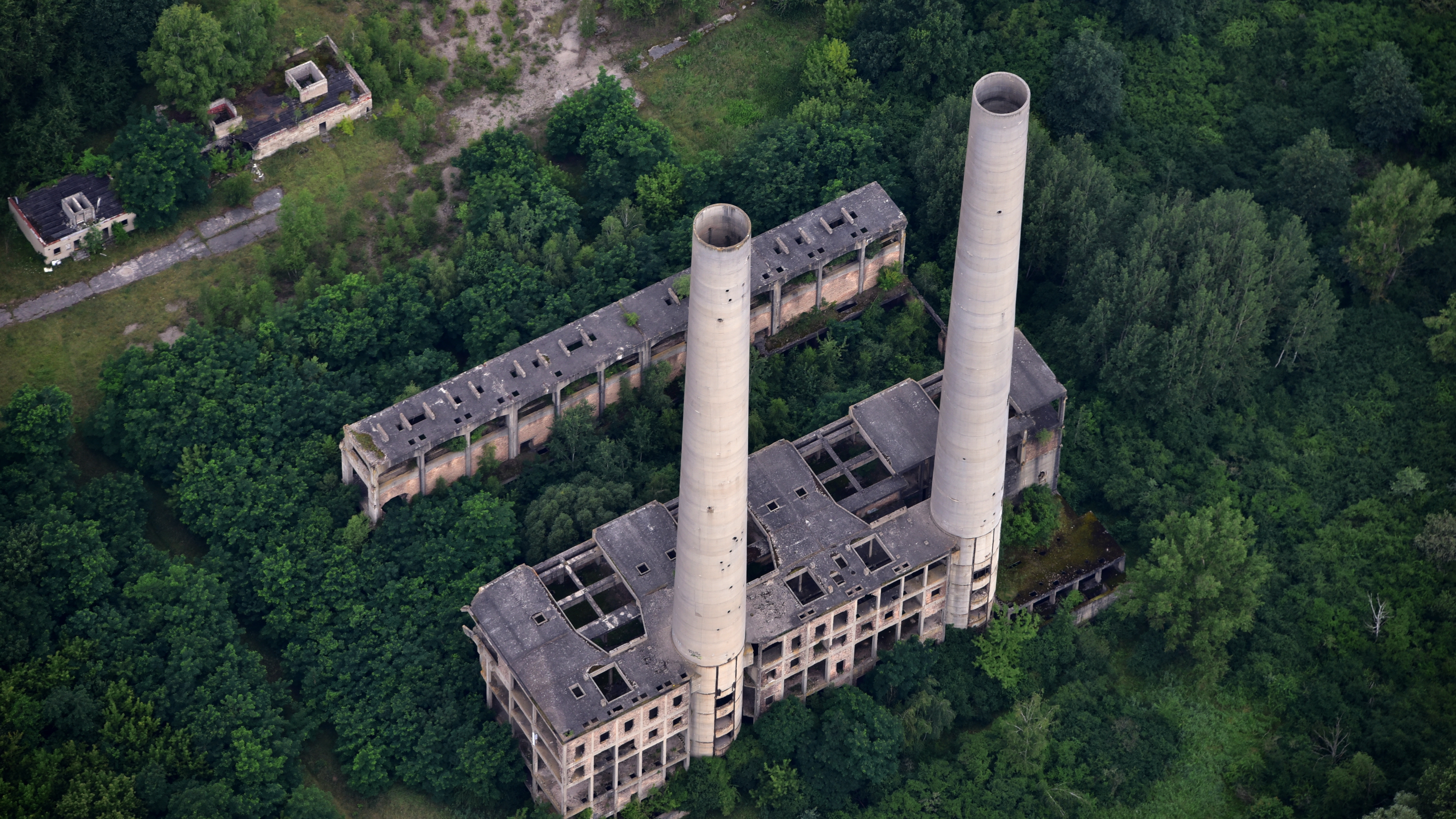 Einheitskraftwerk, Wernerwerk (Kraftwerk Vogelsang), Eisenhüttenstadt, Luftaufnahme (2017)